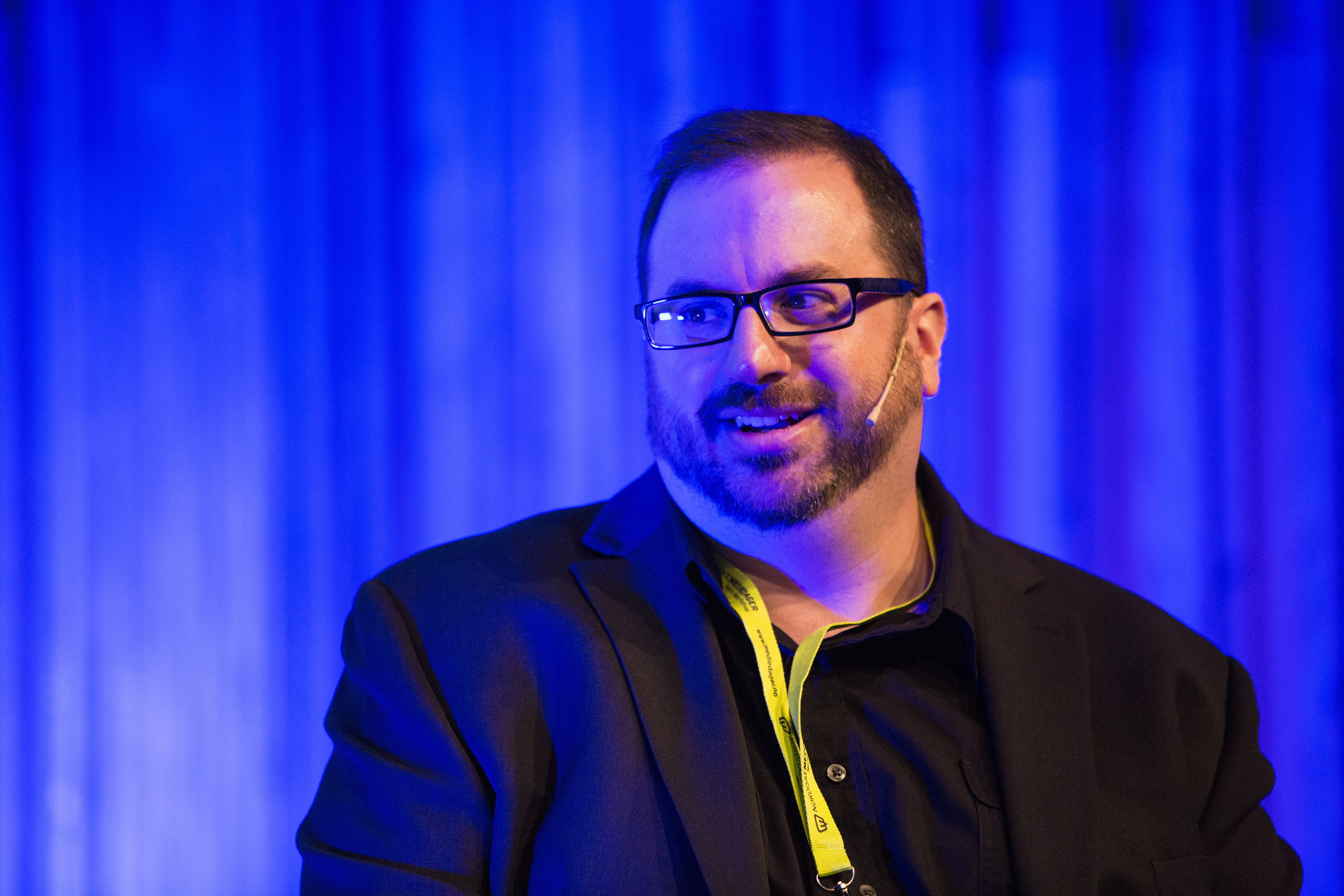 Alan Sepinwall at the Nordiske Mediedager 2015.